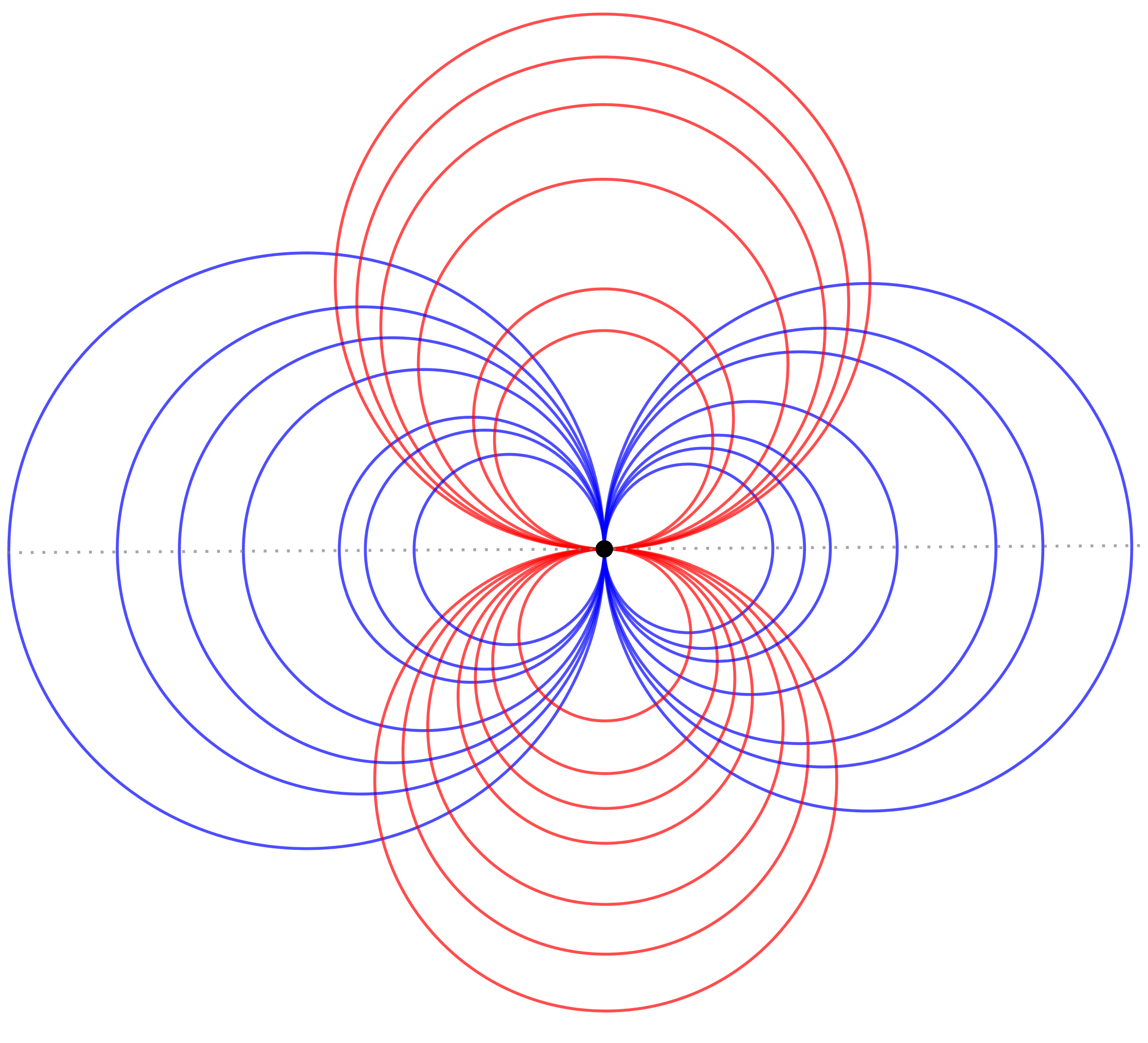 Apollonian circle type 2 (pencil)